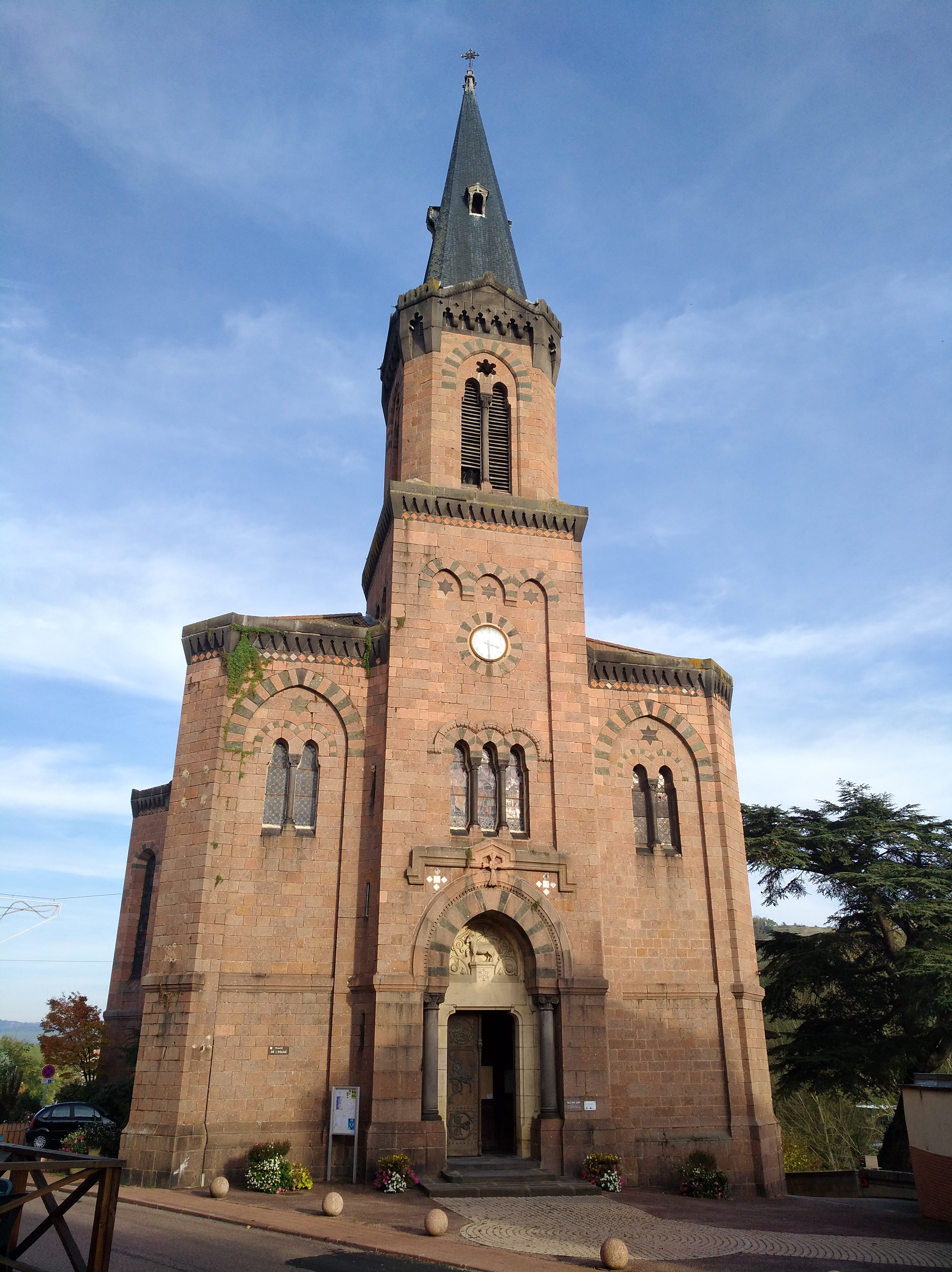 Façade de l'église Saint-Julien de Régny (Loire, France), inscrite au titre des Monuments historiques.